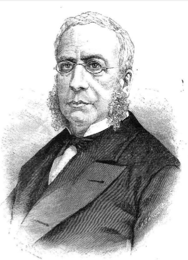 Vicente de la Fuente y Bueno